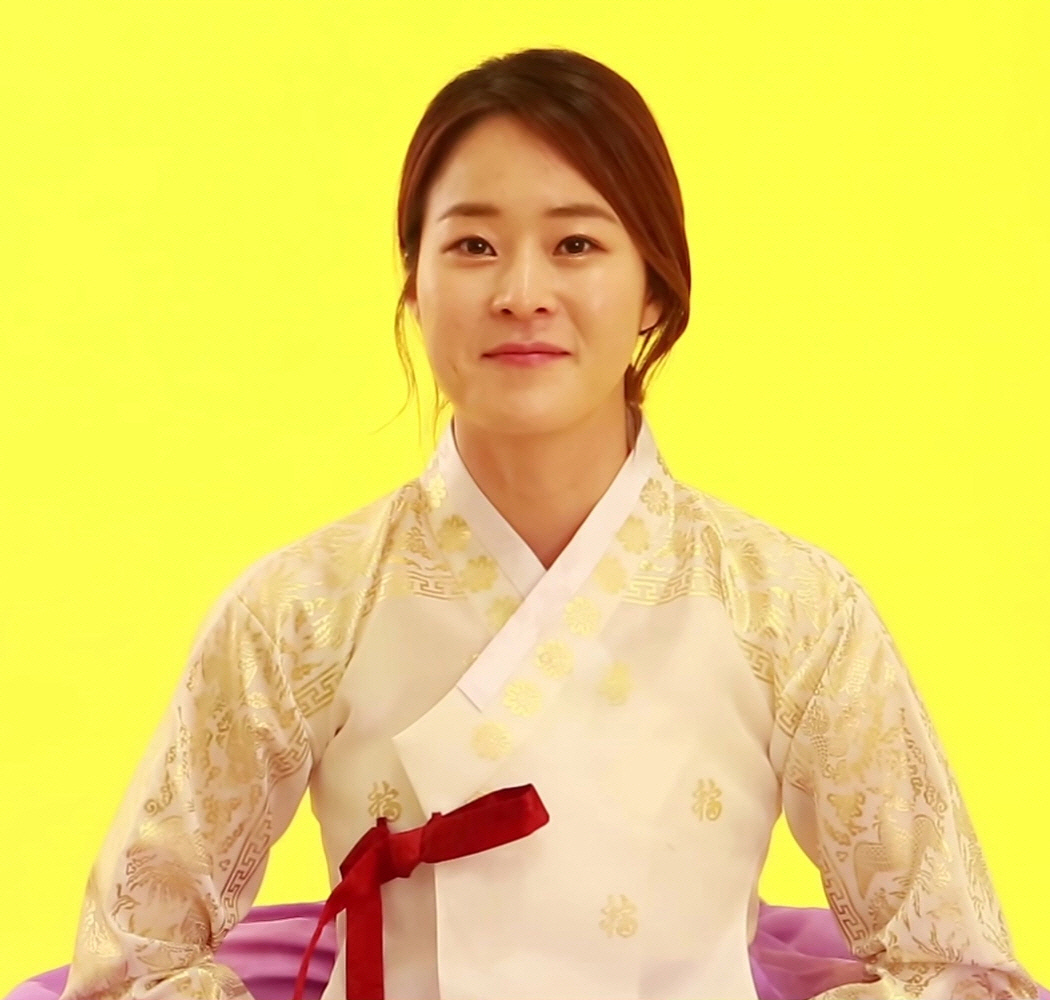 (TV10) 리우올림픽 태권도 금메달리스트 오혜리 화보촬영현장